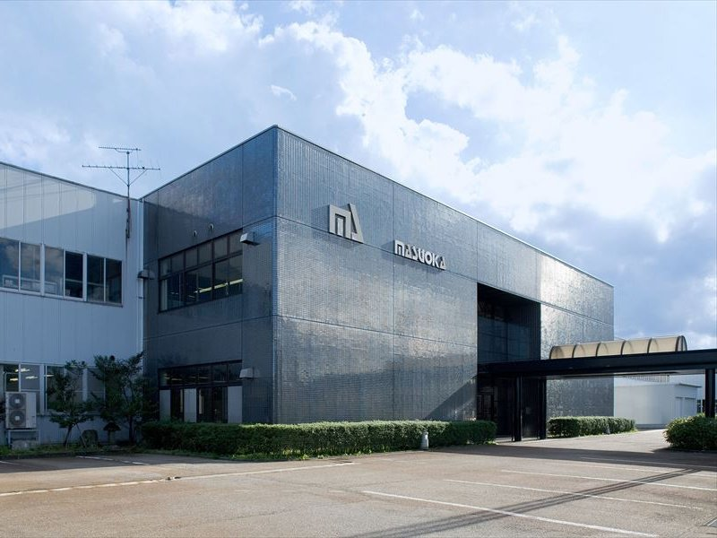 マスオカ本社